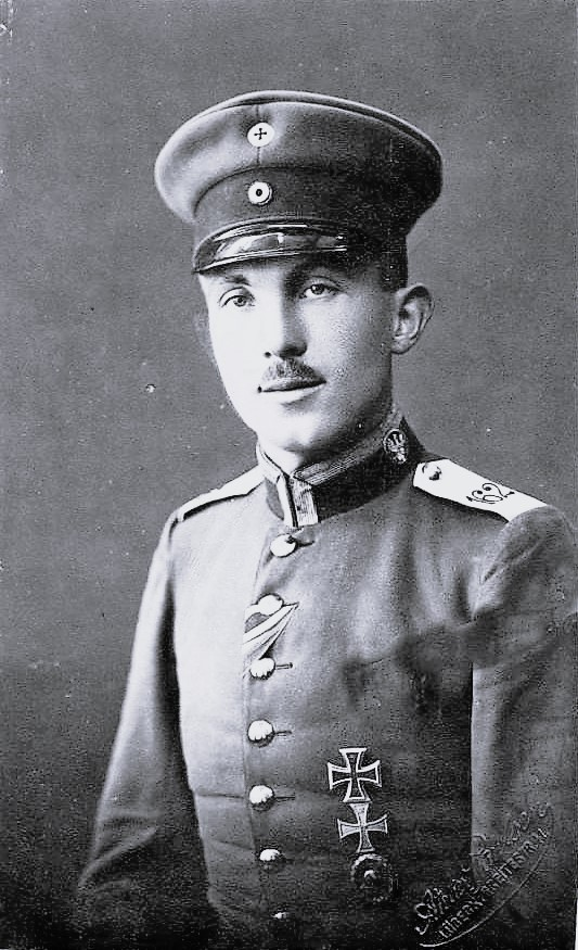 Feldwebel, siehe Unteroffizierlitzen außen am Kragen iVm Feldwebel-Adlerkopf in Höde der Schulterklappen, der 6./162. Anmerkung: Recherchen in den Adressbüchern (Lübecker Stadtarchiv) ergaben, dass Wilhelm Paulsen in dem Adressbuch von 1920 letztmals verzeichnet ist. Sein Atelier trägt ab 1921 die Bezeichnung Atelier Paulsen Nachf, kurz darauf Atelier Andresen. Im Knopfloch trägt der Soldat das schwarz-weiße Band des EK II sowie das rot-weiße des Lübecker Hanseatenkreuzes. Er trägt als Steckorden von oben nach unten: Eisernes Kreuz I. Klasse, Mecklenburgisches Militärverdienstkreuz I. Klasse sowie das Verwundetenabzeichen (Schwarz [gleich] 1 bis 3 Verwundungen).